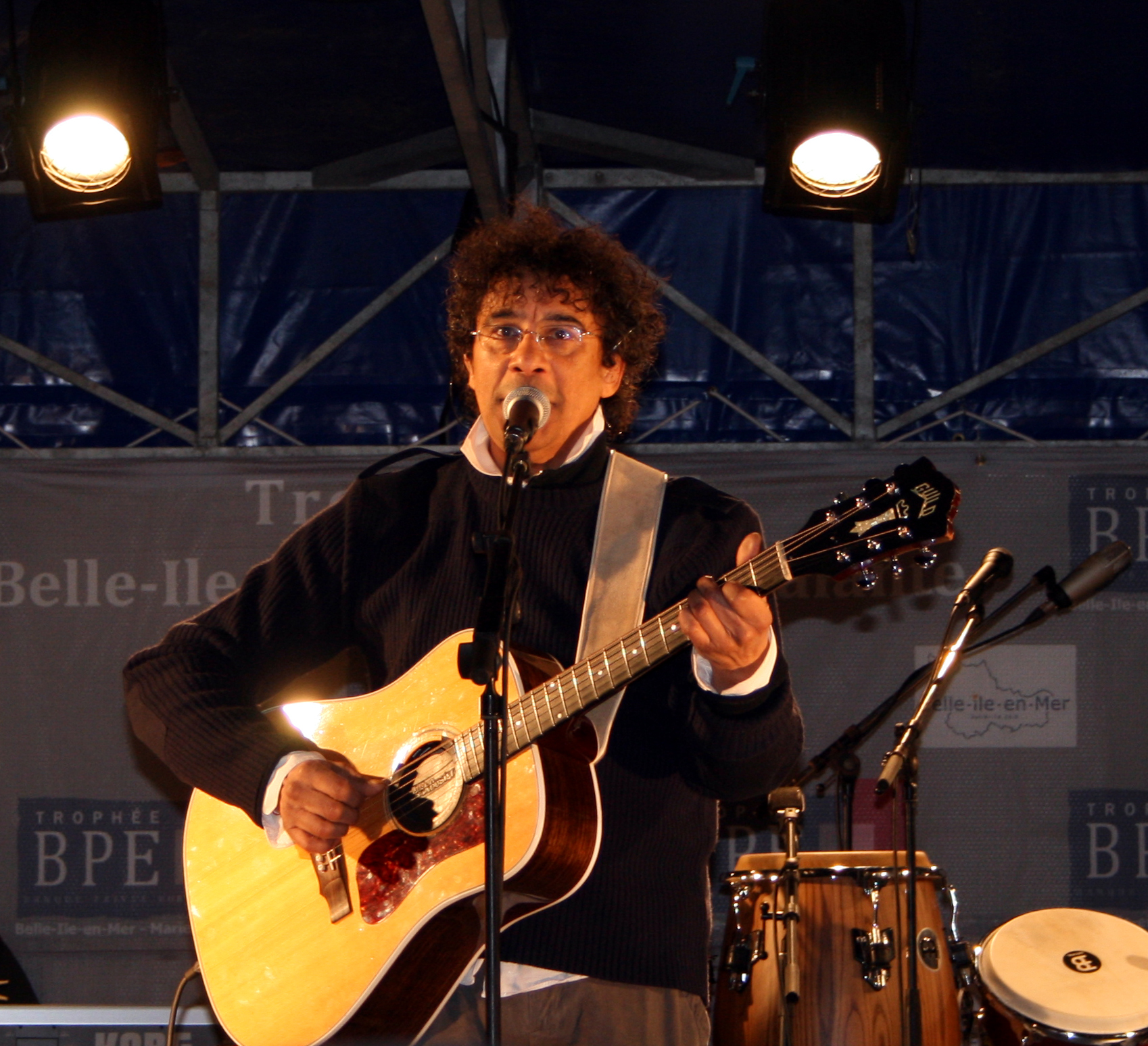 Description =Laurent Voulzy en concert a Belle-Ile lors du Trophée BPE Source =Photo taken by Remi Jouan Date =Mars 2007 Author =Remi Jouan